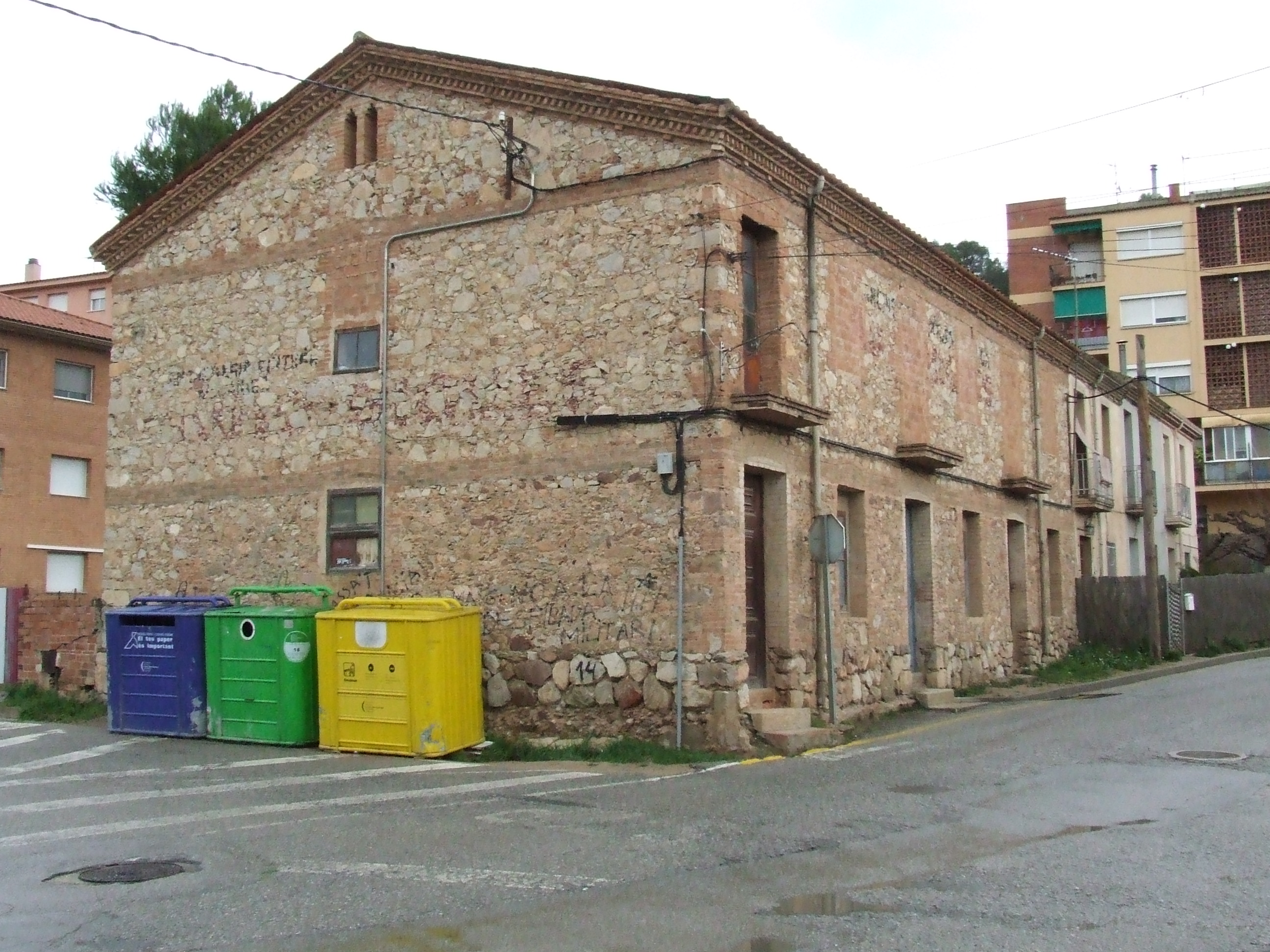 El Barri Montserrat (Bigues, Bigues i Riells, Vallès Oriental).